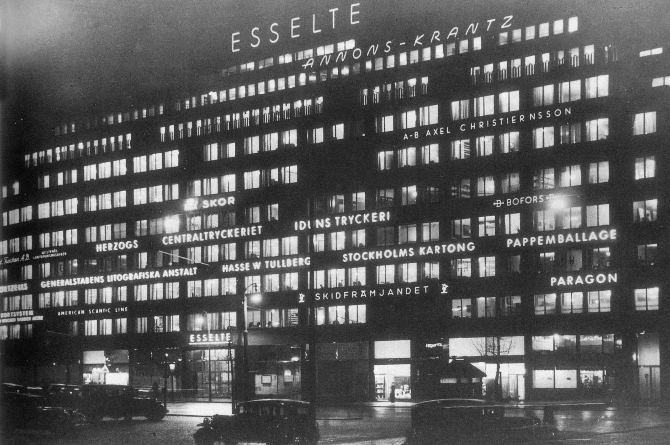 Esselte-husets reklamfasad cirka 1935